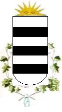 Escudo de la municipalidad de Cafayate.